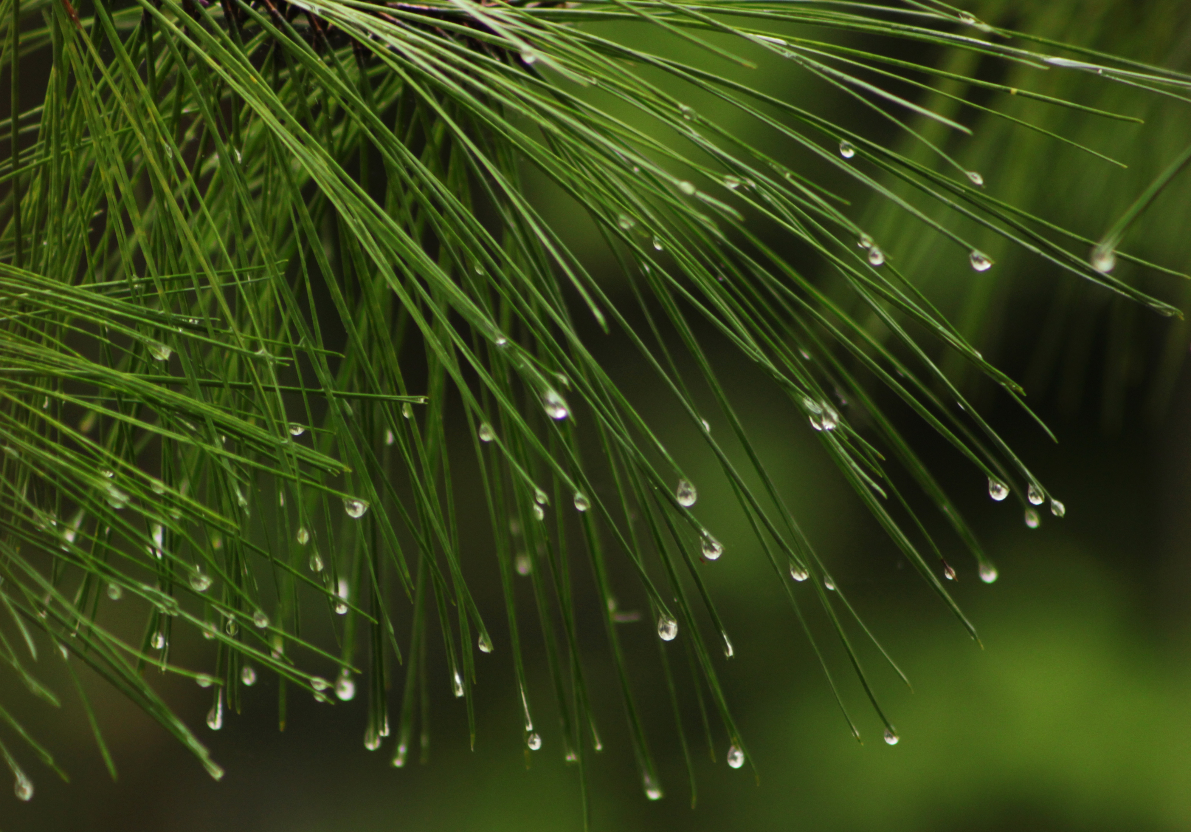 این نگاره (برگ های کاج و قطرات شبنم روی آن ها) را ش. عظیمی (مهندس معمار و عکّاس اهل کرج) گرفته است و با اجازۀ وی بارگذاری شده است